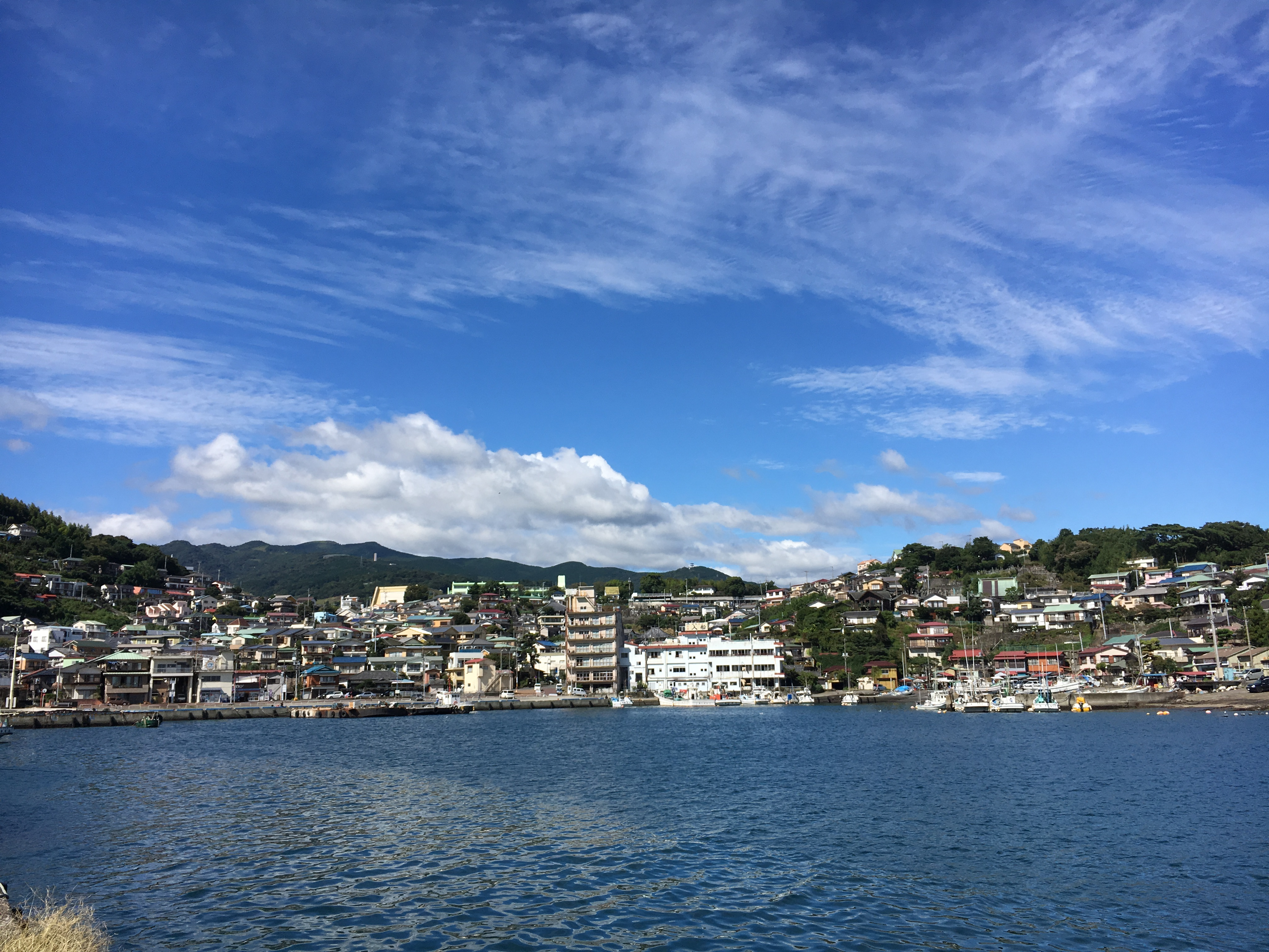 真鶴町の漁港 しとどの窟、魚座付近